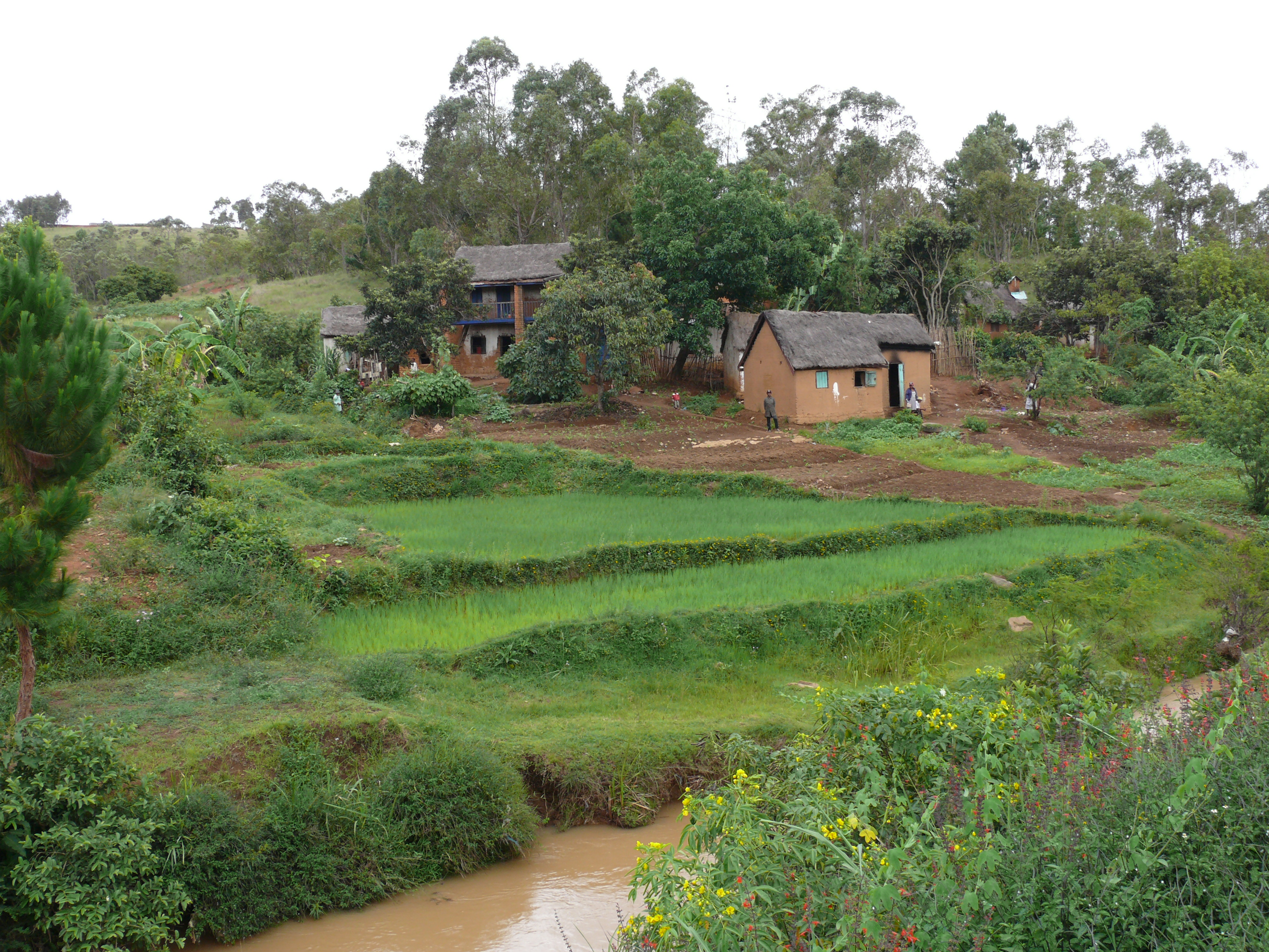 Rizière en terrasses à Madagascar